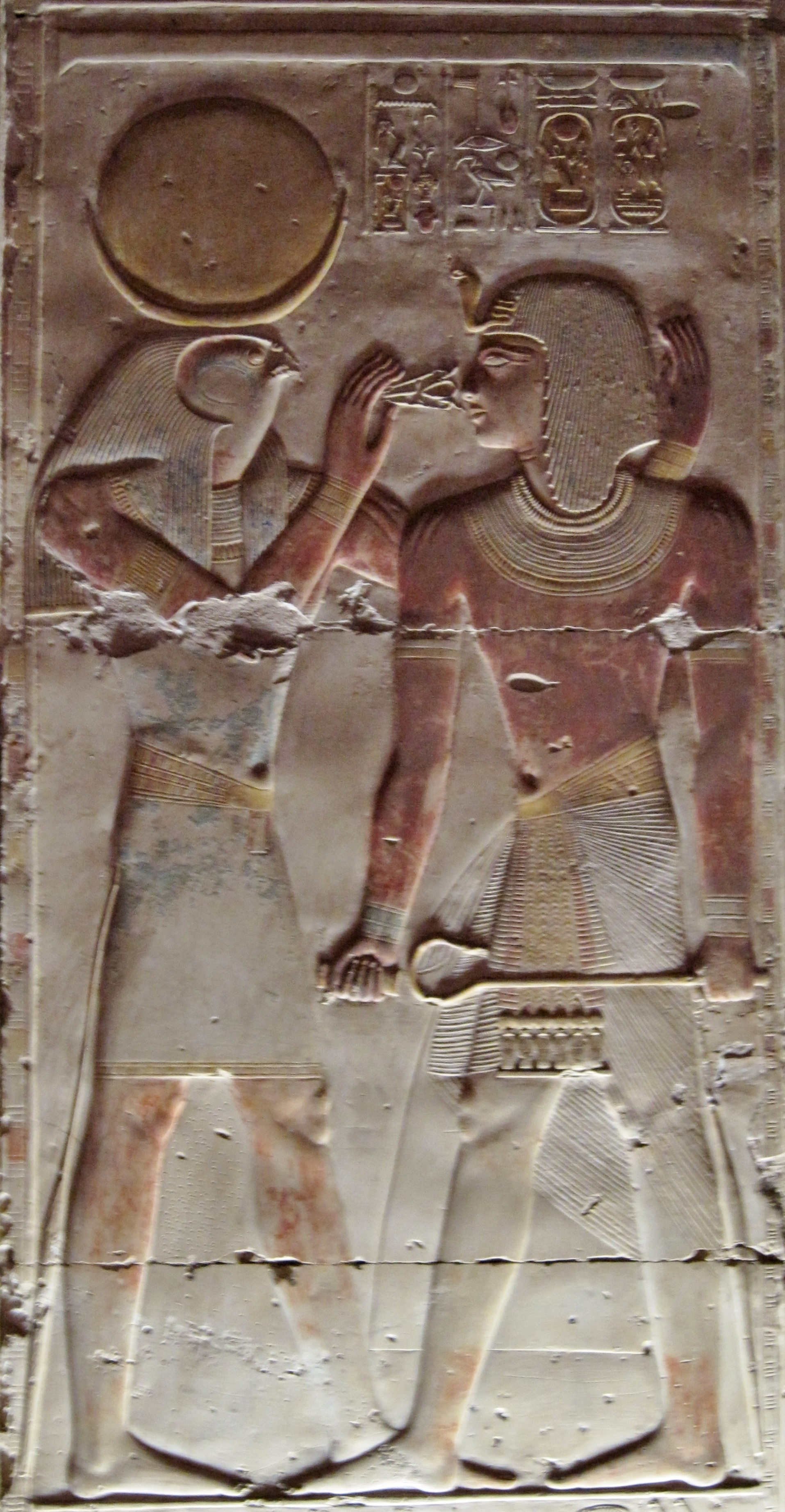 Relief des Gottes Chons in Falkengestalt, der dem König Sethos I. das Anch-Zeichen des Lebens und Wohlstands reicht, im Totentempel Sethos I. in Abydos, Ägypten